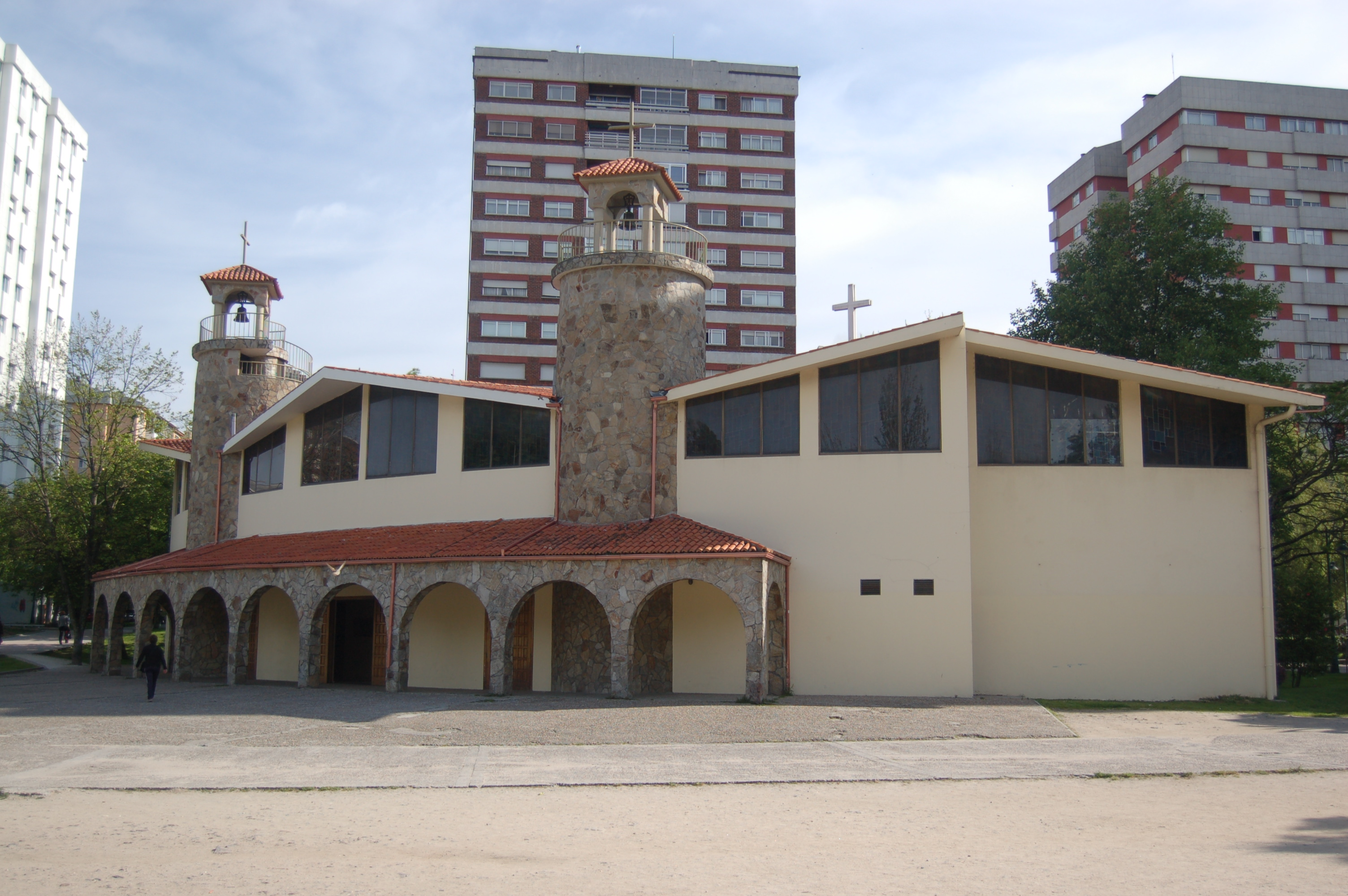 Igrexa parroquial de San Xosé de Campolongo (Pontevedra)